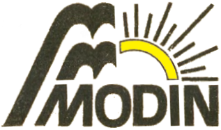 Logo MODIN